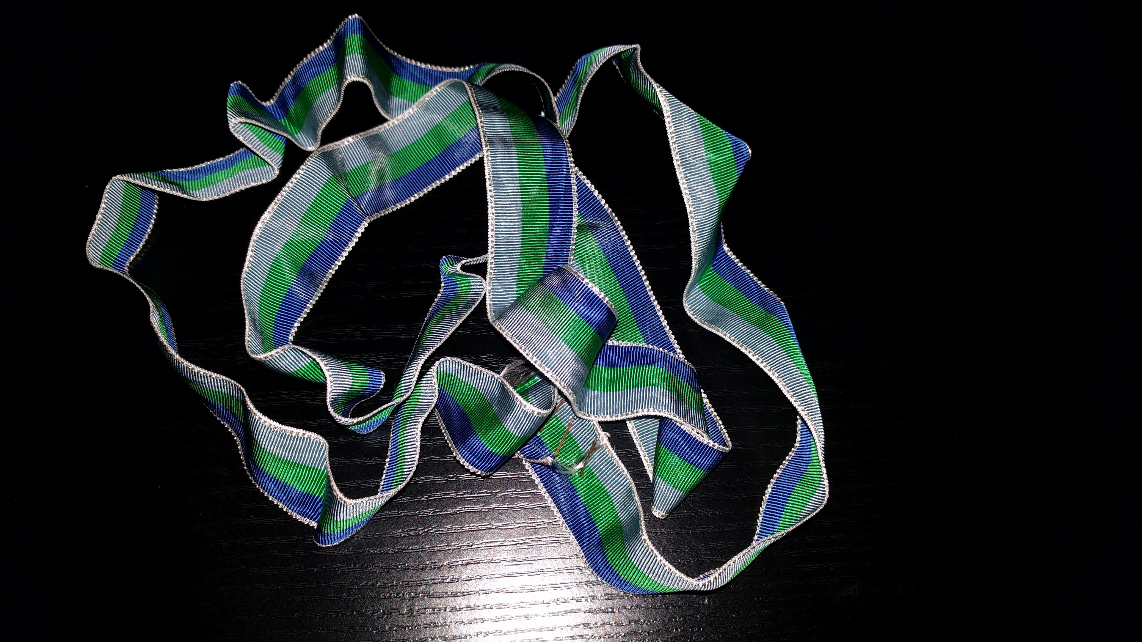 Band der Rheno-Fua-Ndem; eigenes Band